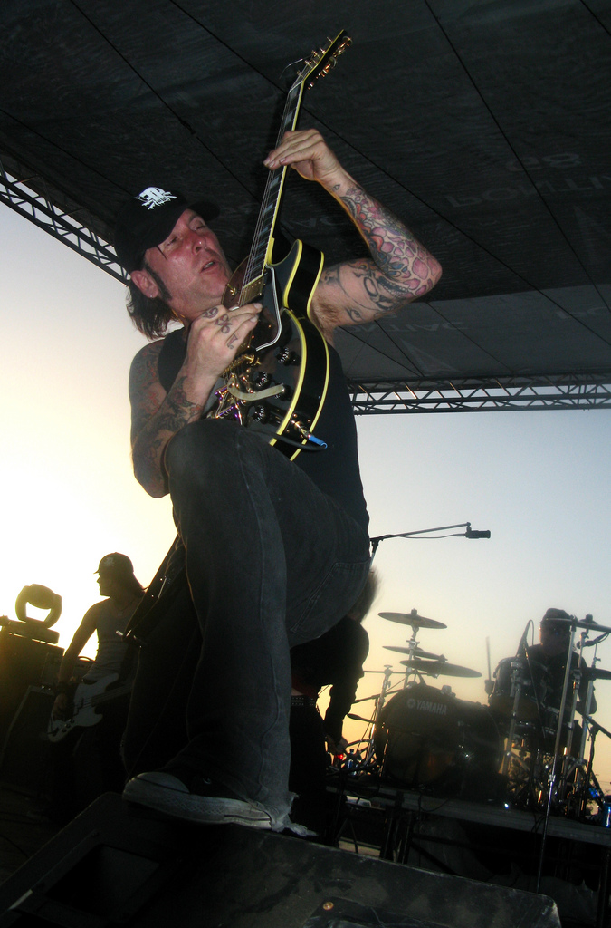 Emiliàn e rumagnòl: Tracii Guns di L.A. Guns tòlt śò al 12 ad Luj dal 2008